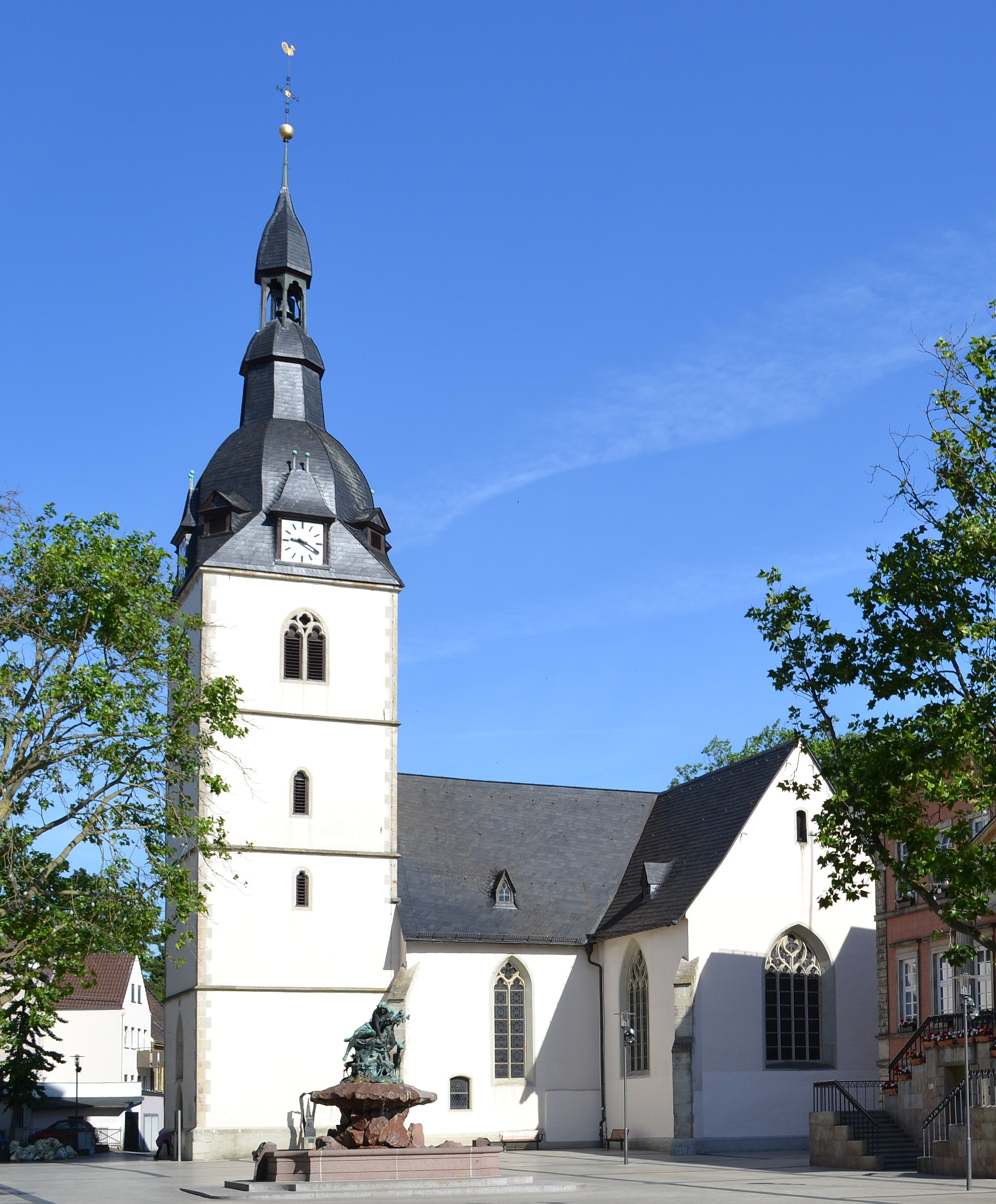 Baudenkmal Detmold Nr. 125 - Evangelisch-reformierte Erlöserkirche am Markt Marktplatz